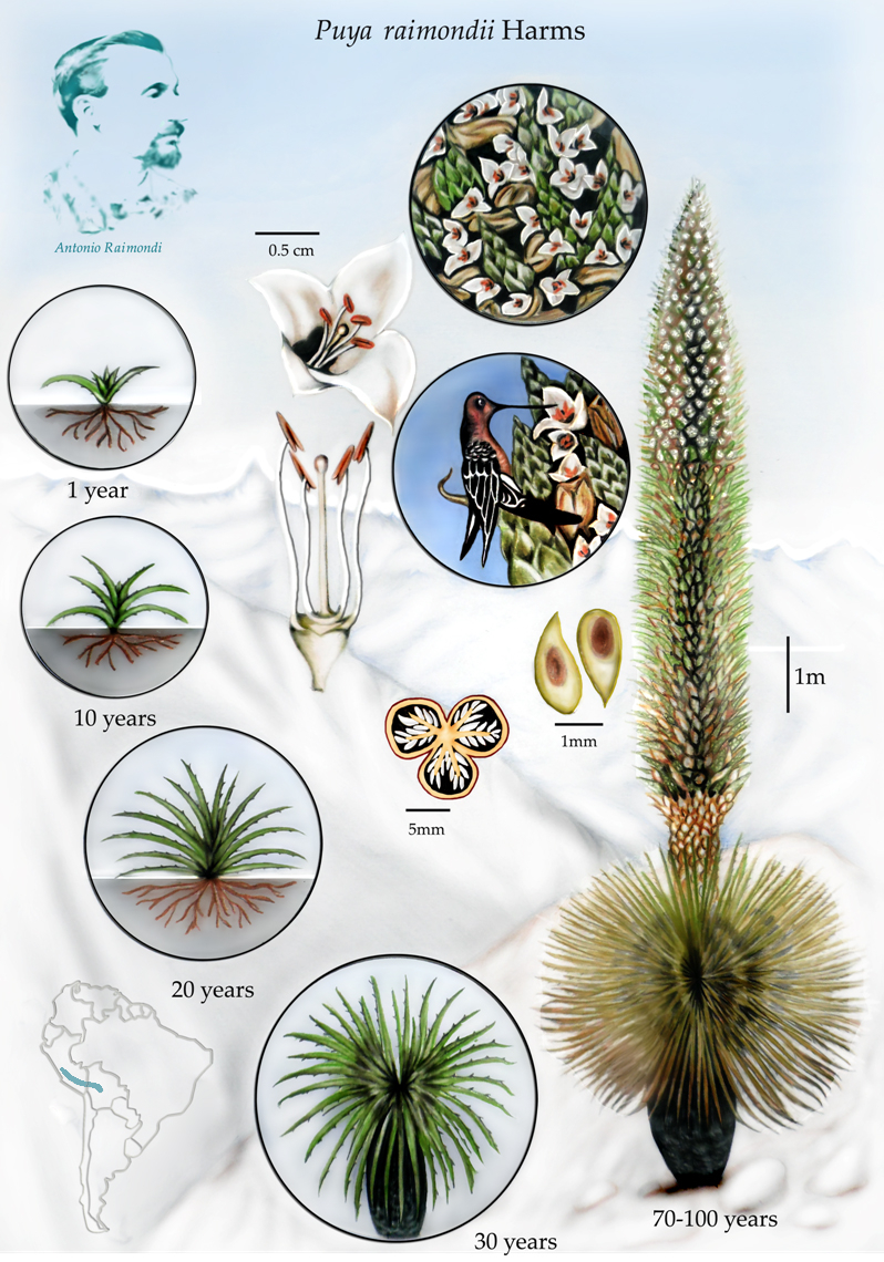 Puya raimondii Harms (Bromeliaceae) es una especie endémica de la zona altoandina del Perú y Bolivia, distribuida entre 3200 y 4800 m de altitud que sobresale por su gran tamaño y belleza. Lleva ese epiteto específico en honor al sabio ítalo-peruano Antonio Raymondi quien la describió por primera vez. Presenta una única floración, cuando un ejemplar alcanza al menos una altura de 10 -15 m en condiciones naturales llegando a superar los 70 años de vida. Presenta como principal polinizador al colibri Patagona gigas, mas sus flores tambien son visitadas por otros animales.